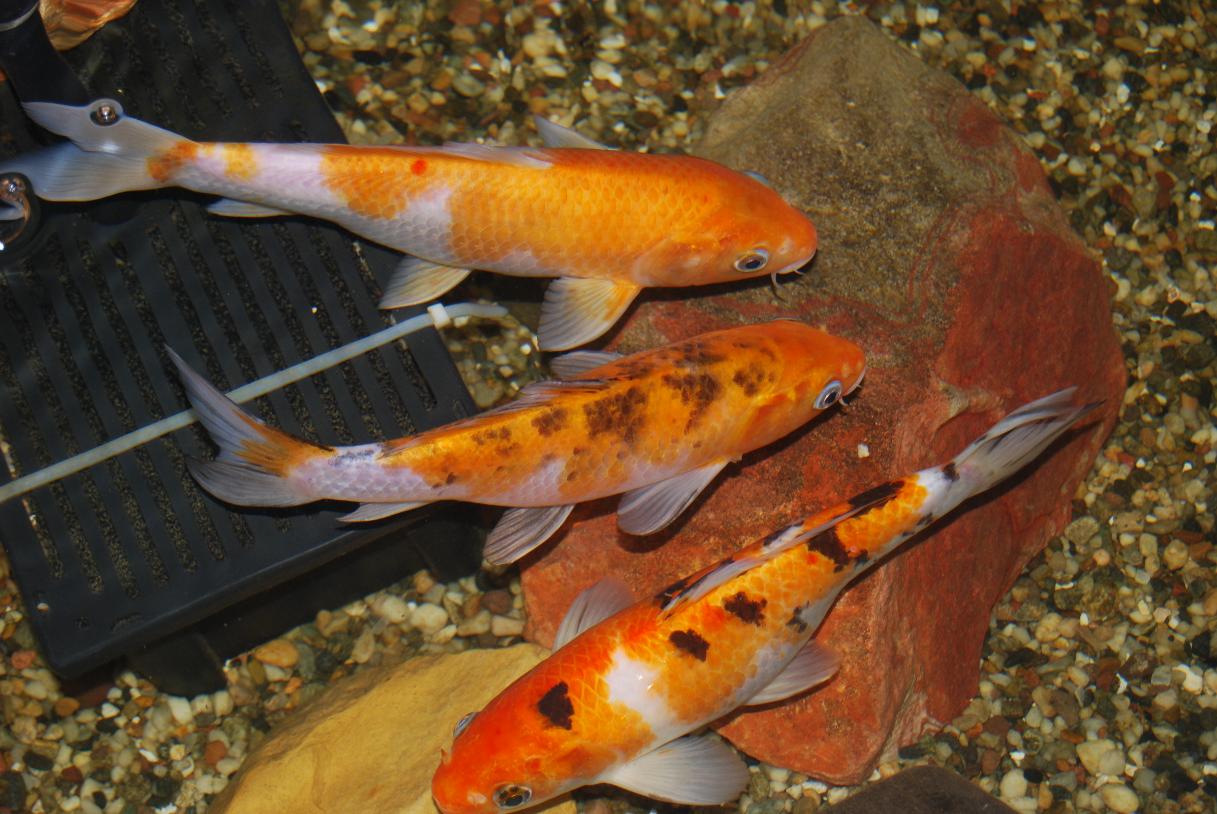 Koi